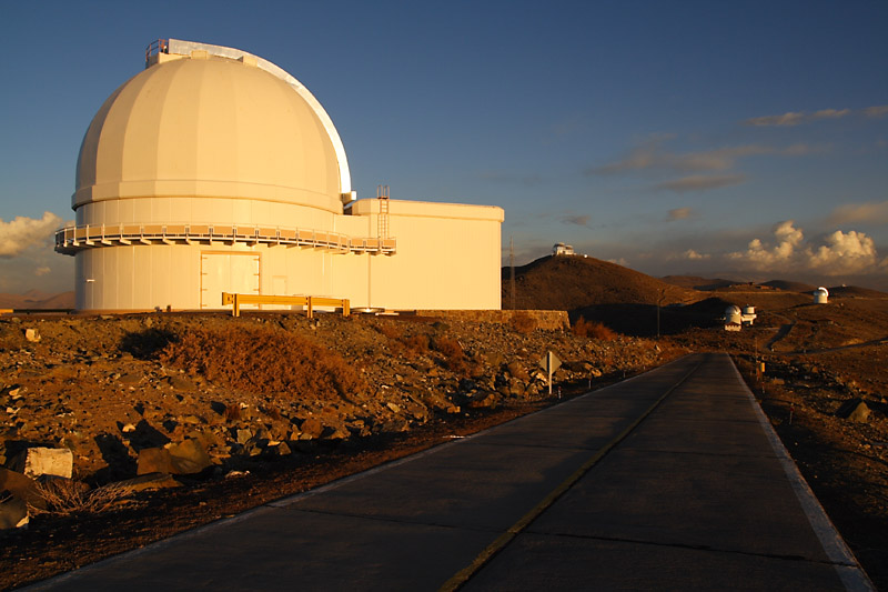 Irénée du Pont Telescope at Las Campanas Observatory.